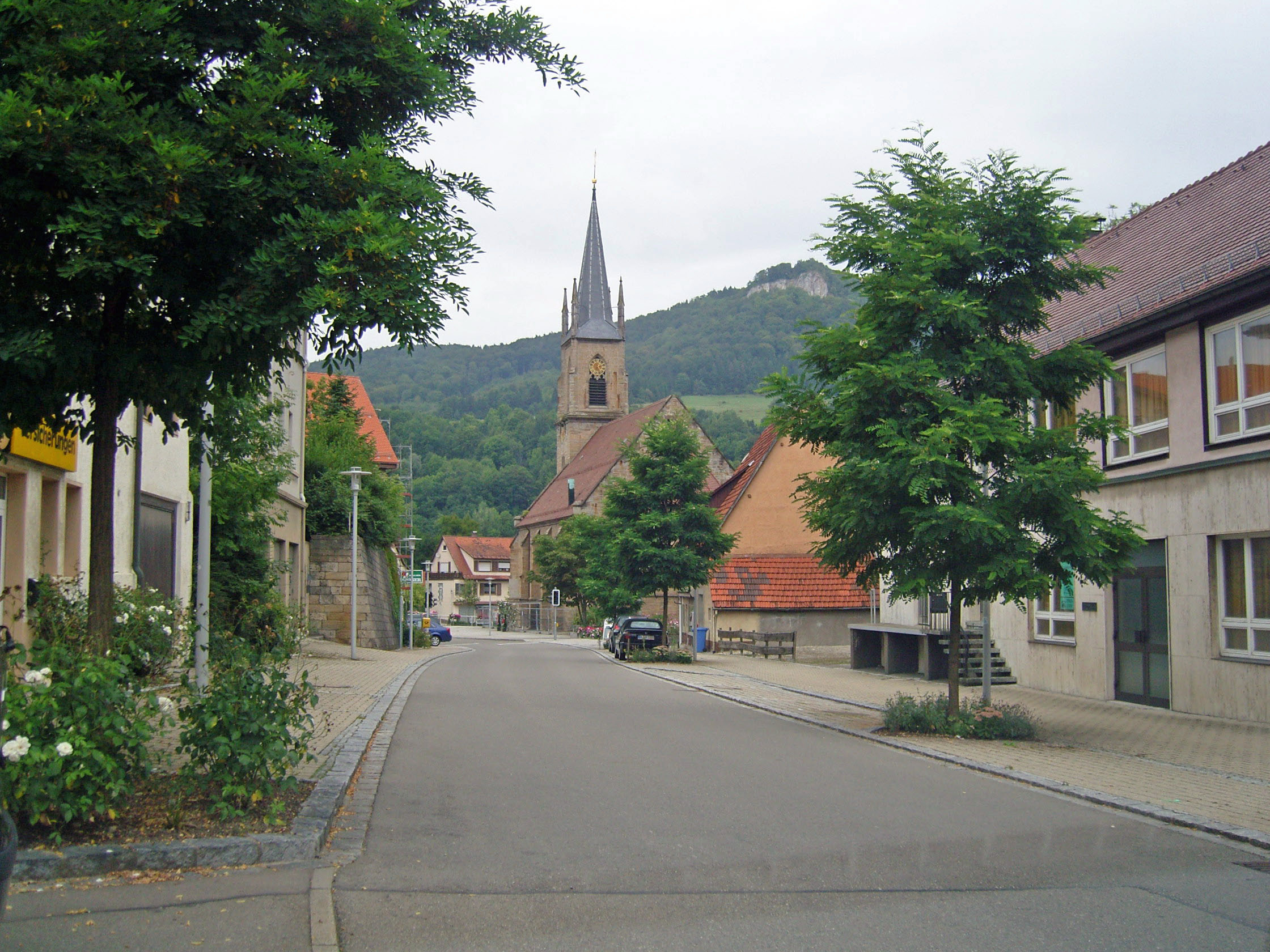 Kirche und Ortsmitte Laufen an der Eyach